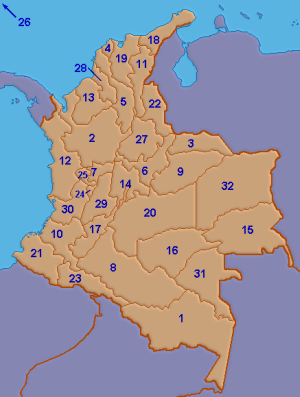 Departamentos de Colombia Mapa de departamentos de Colombia numerados